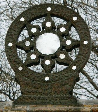 广济寺天王殿上的装饰 用心阁于2005年2月9日拍摄于北京广济寺天王殿前